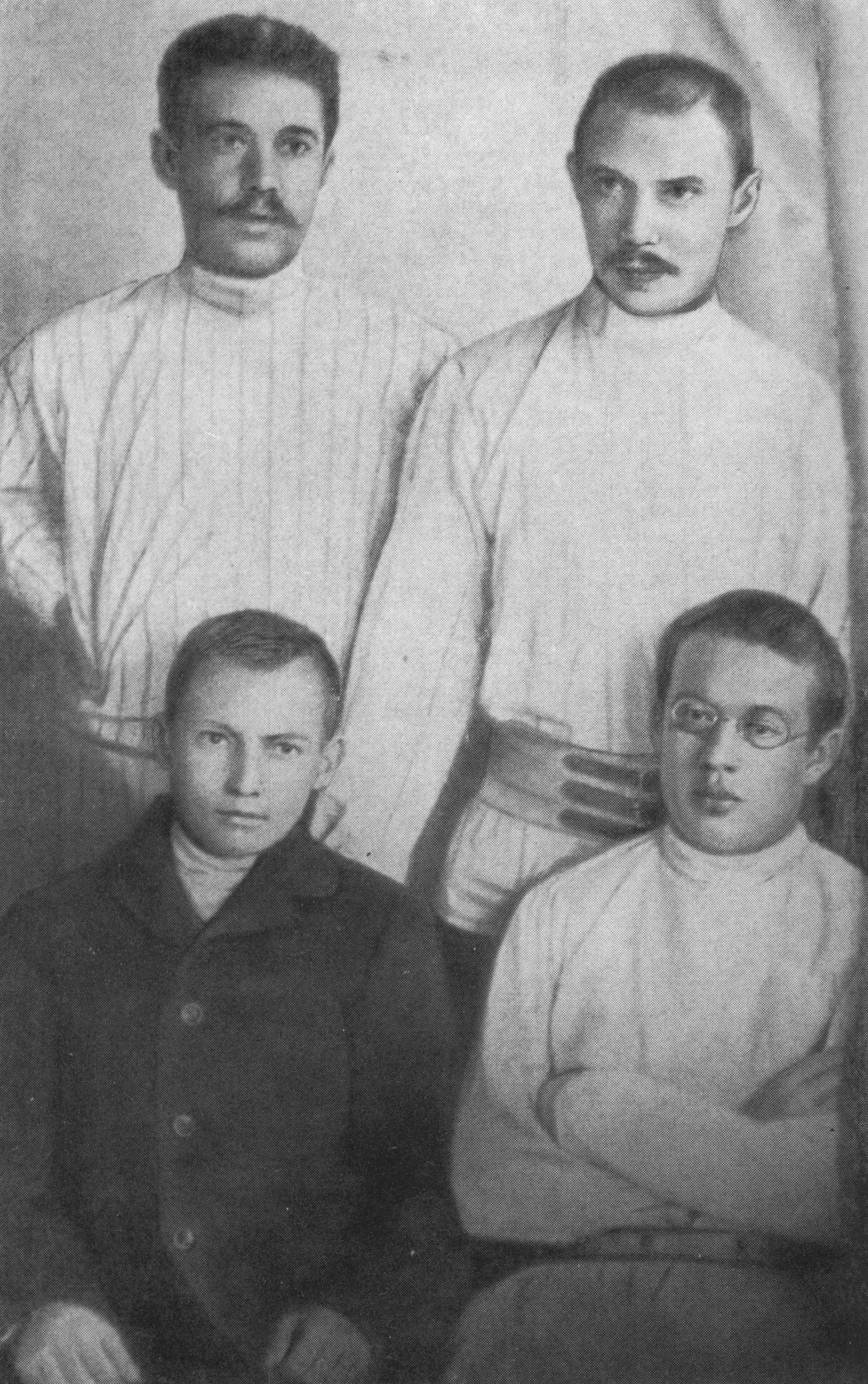 Tuqay, Qolaxmatovs, Amirxan